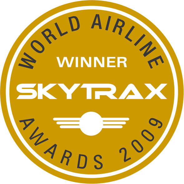 SkyTrax logo